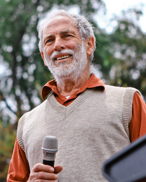 Héctor Noguera, actor chileno, en un acto de la candidata Michelle Bachelet.